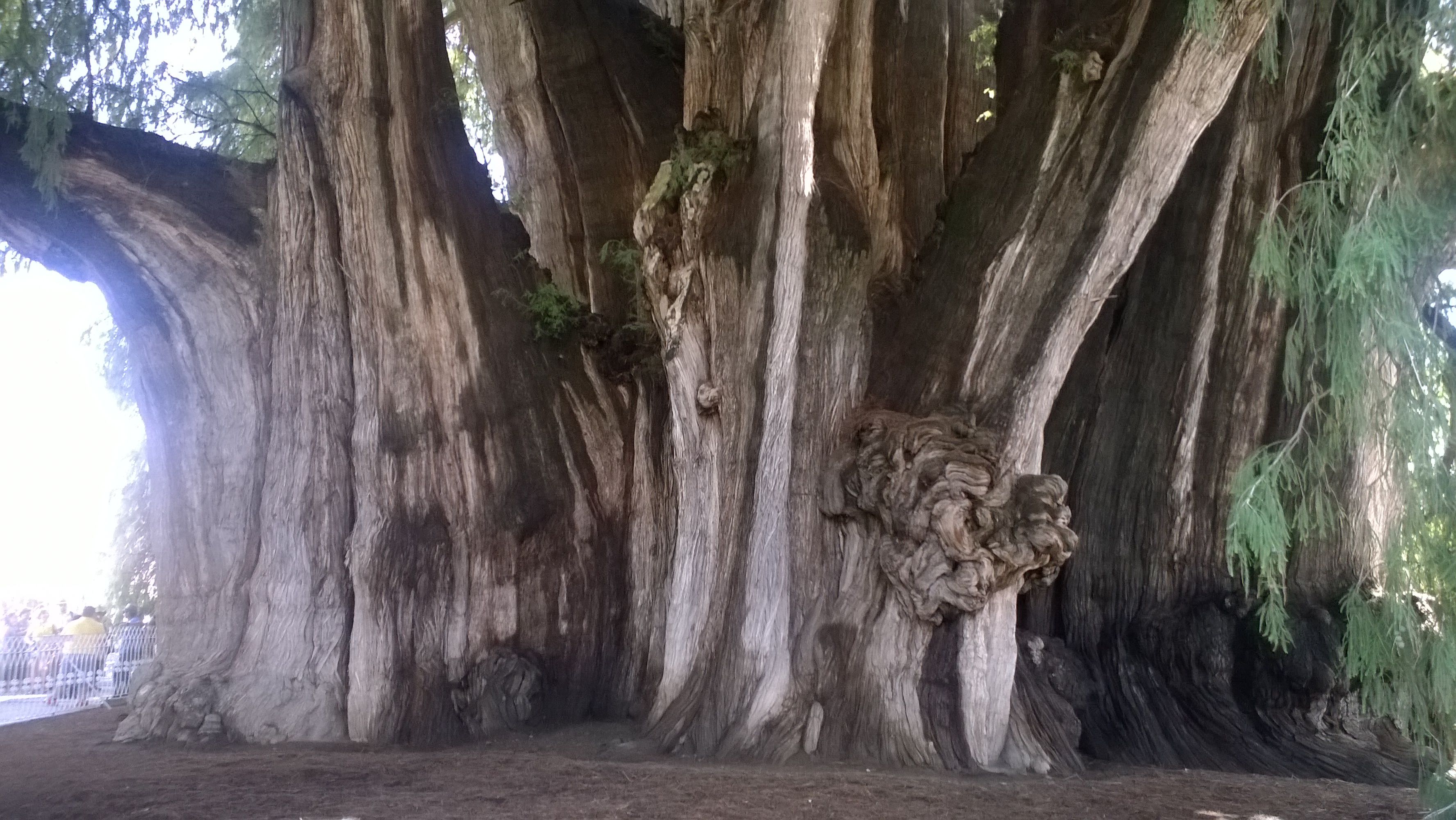 El Árbol del Tule